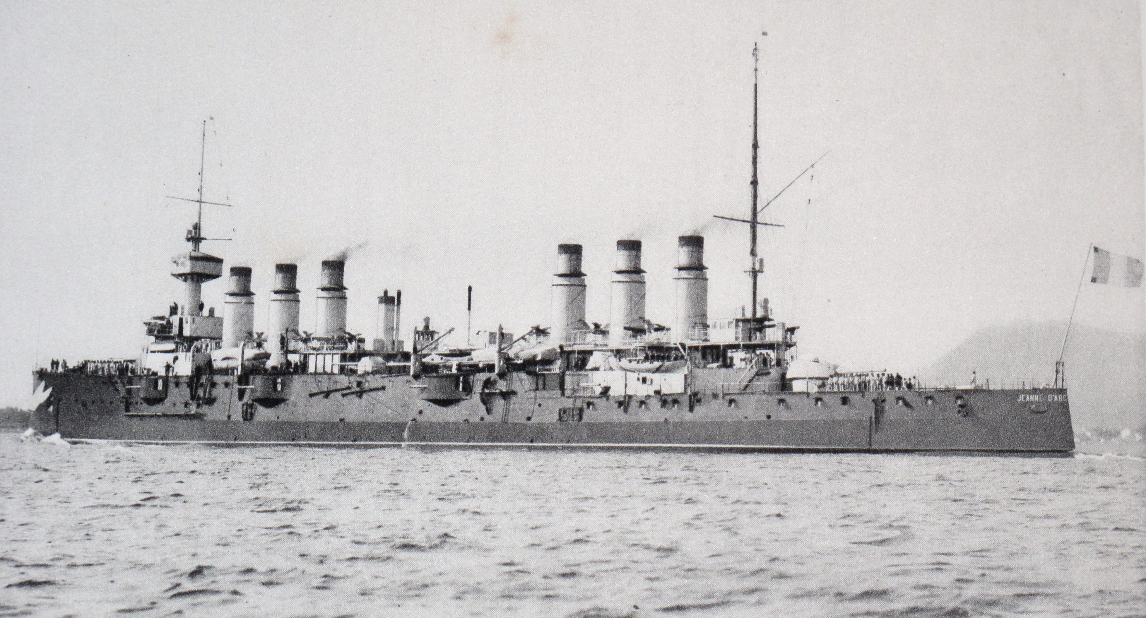 French cruiser Jeanne d'Arc